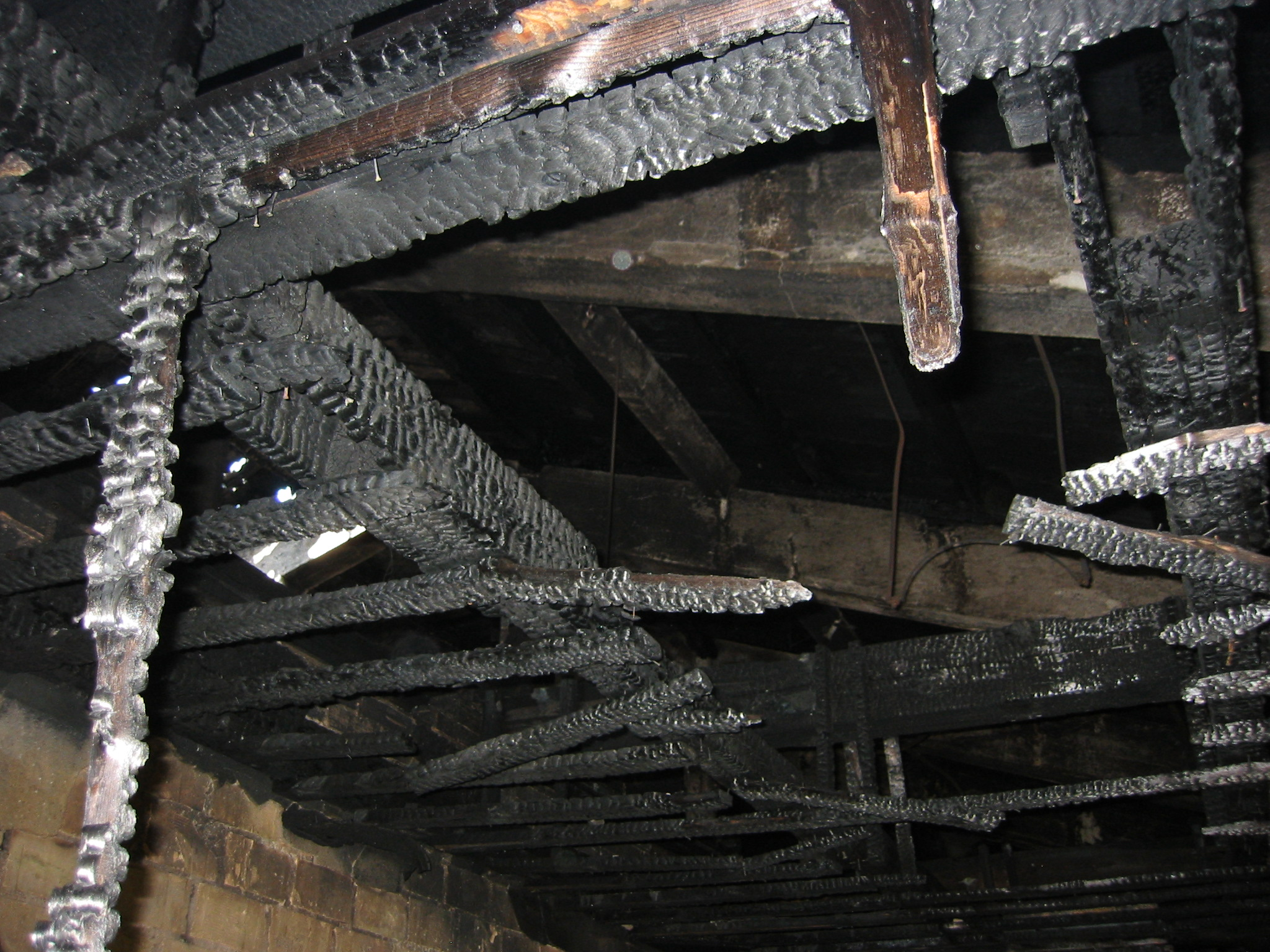 Blick in das Dachgeschoss eines abgebrannten Gebäudes bei einem Großbrand in Luckenwalde, 2004